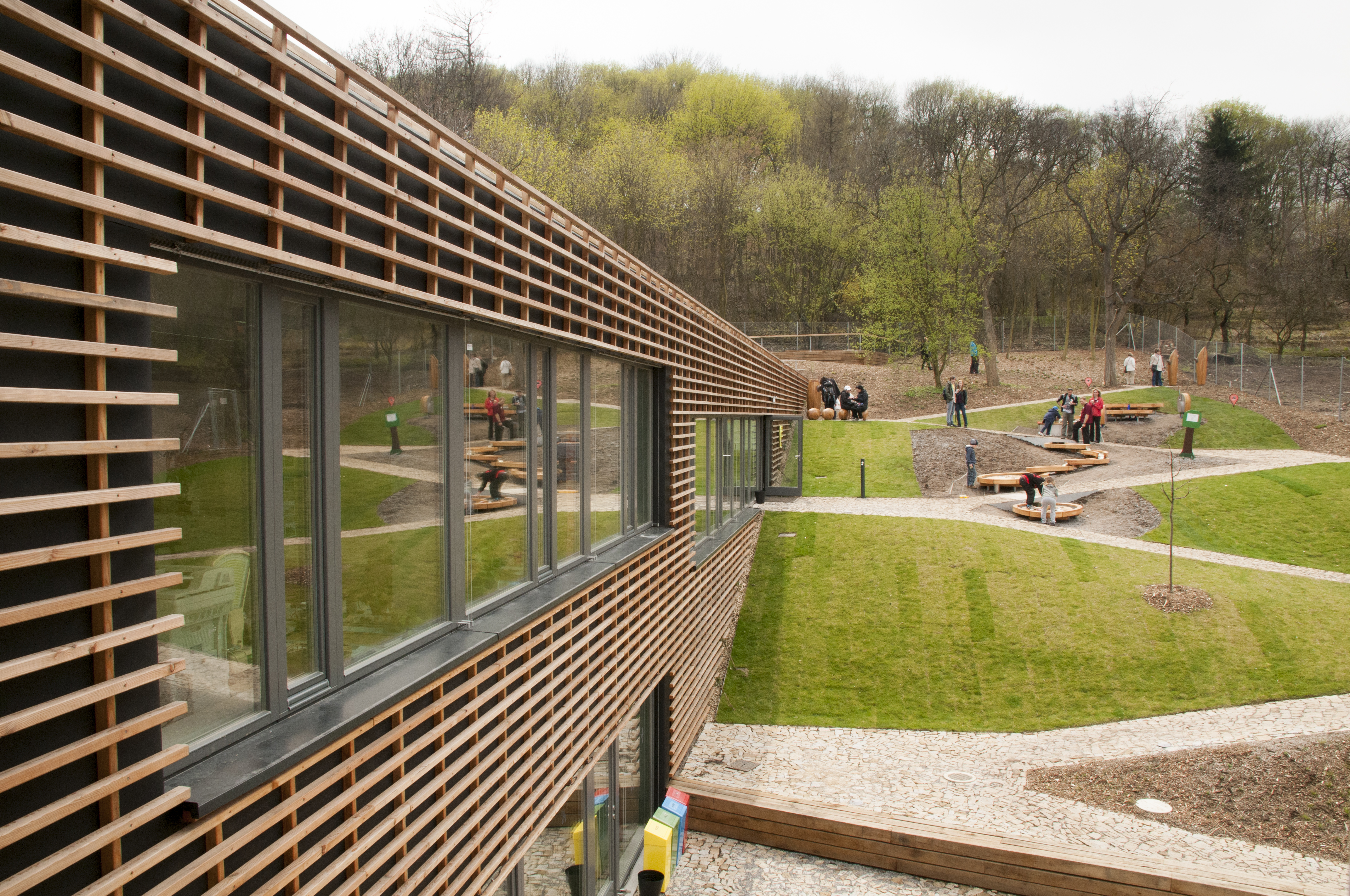 Fasáda pasivního domu